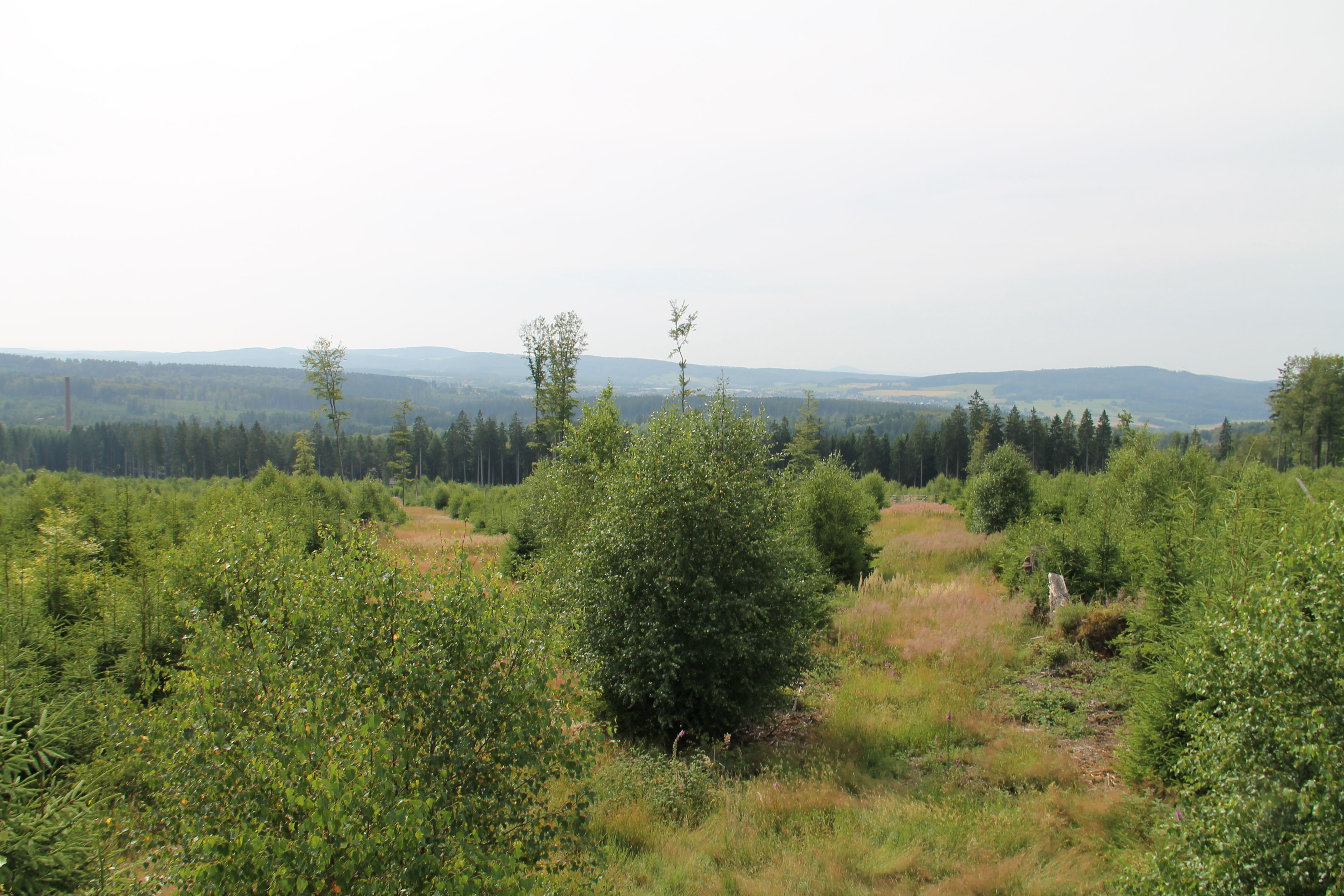 Rohrberg Hessisch Lichtenau vor Errichtung des Windpark. Aufwuchs nach dem Orkan Kyrill in 2007